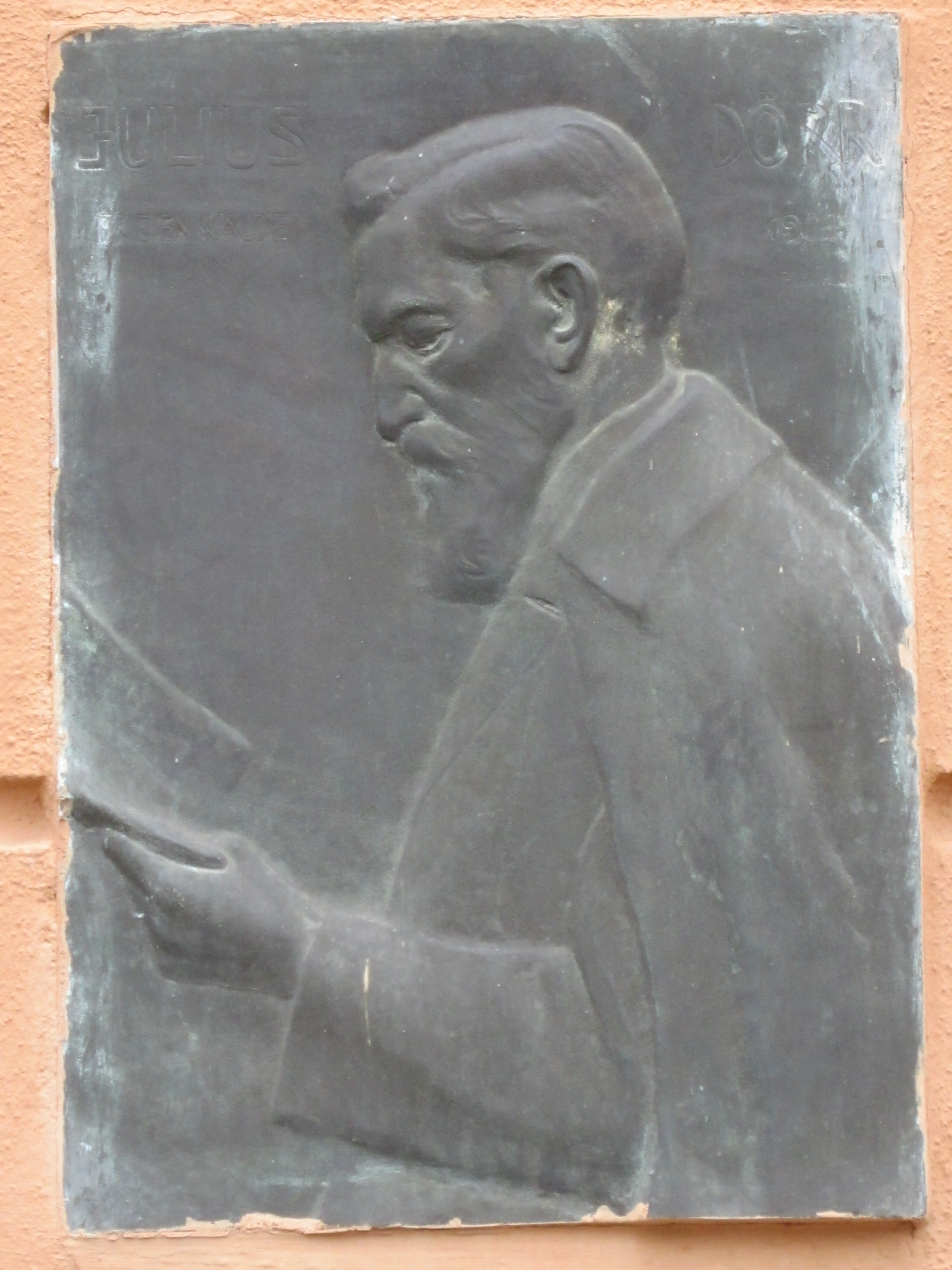 Plakette für Julius Dörr (1850–1930) an seinem Wohnhaus in Bad Freienwalde